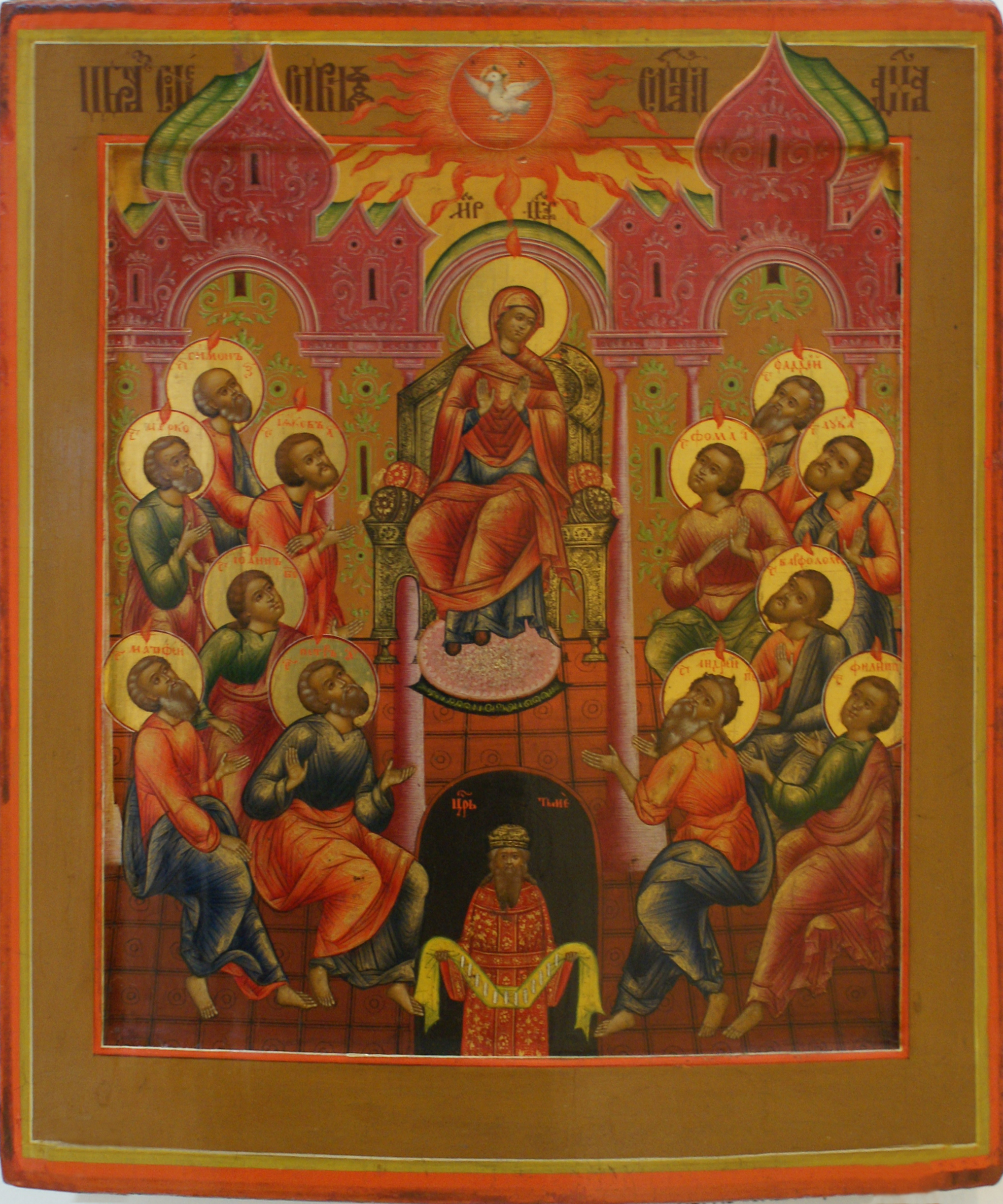 Абраз "Сашэсце Святога Духа".